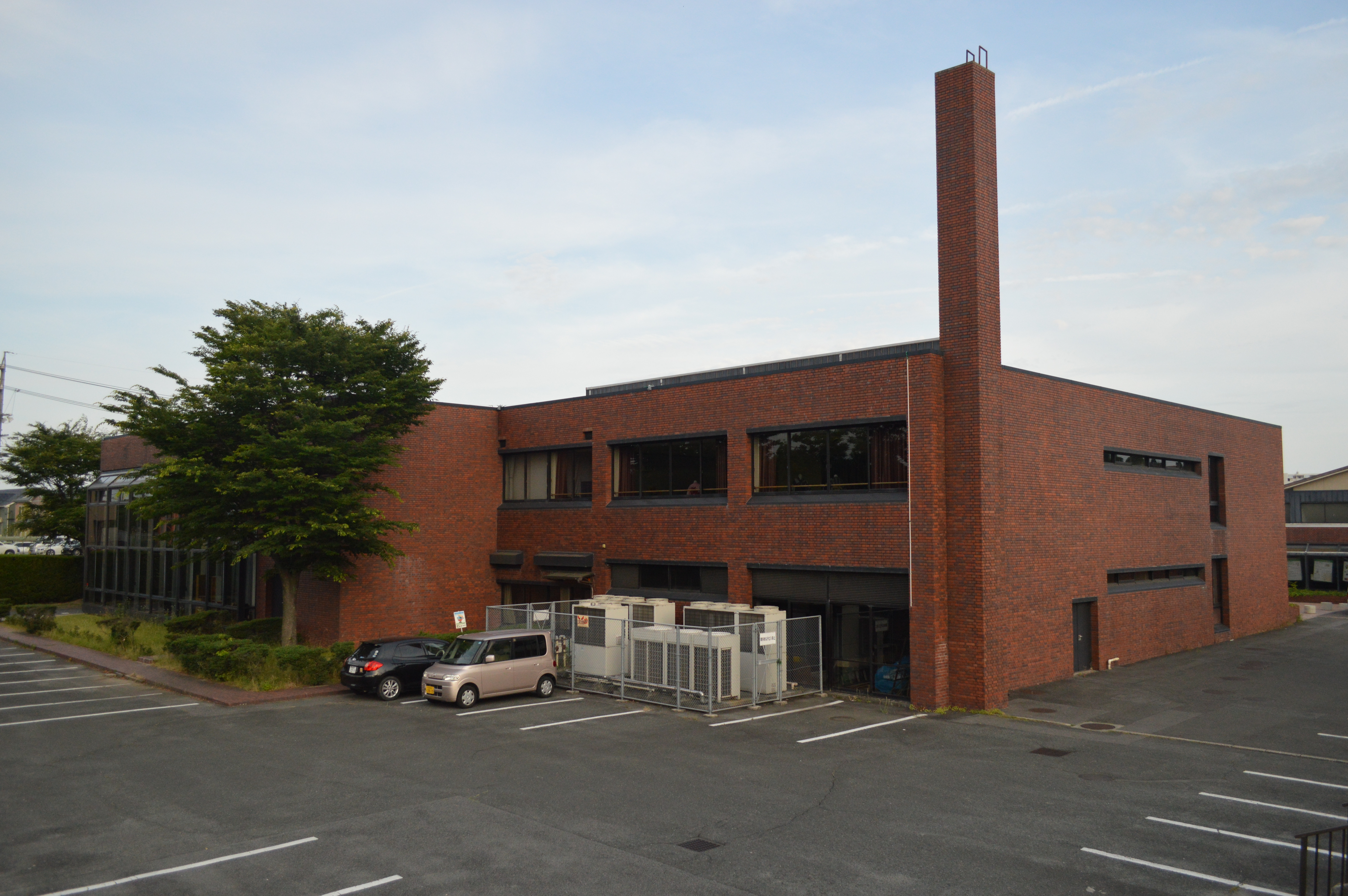 東浦町役場中央公民館